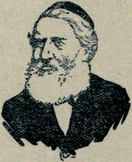 ייִדיש: אליעזר-צבי צווייפעל: ייִדיש: אמנטאָלאָגיע פינף הונדערט יאָהר אידישע פּאָעזיע